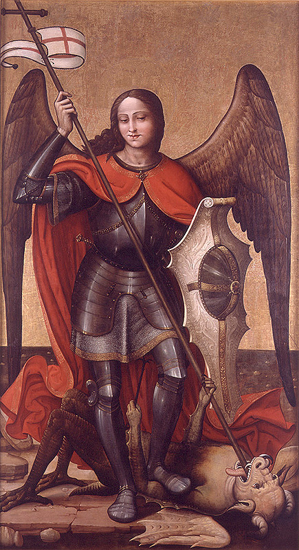 La obra representa a San Miguel Arcángel derrotando al demonio.